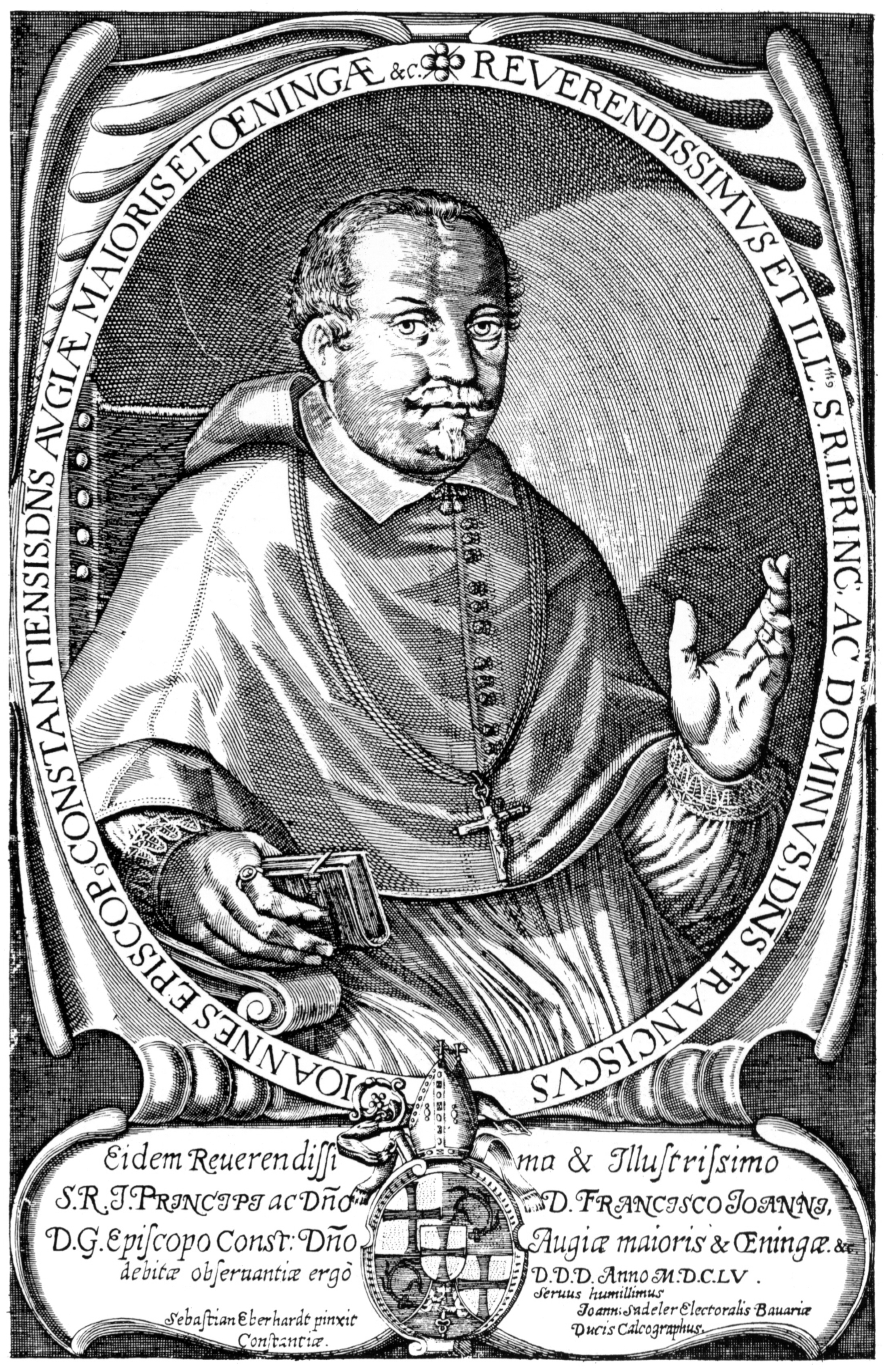 Franz Johann von Praßberg, Bischof von Konstanz 1645–1685; Kupferstich von Johann Sadeler nach Sebastian Eberhardt; 1655. Stadtarchiv Konstanz